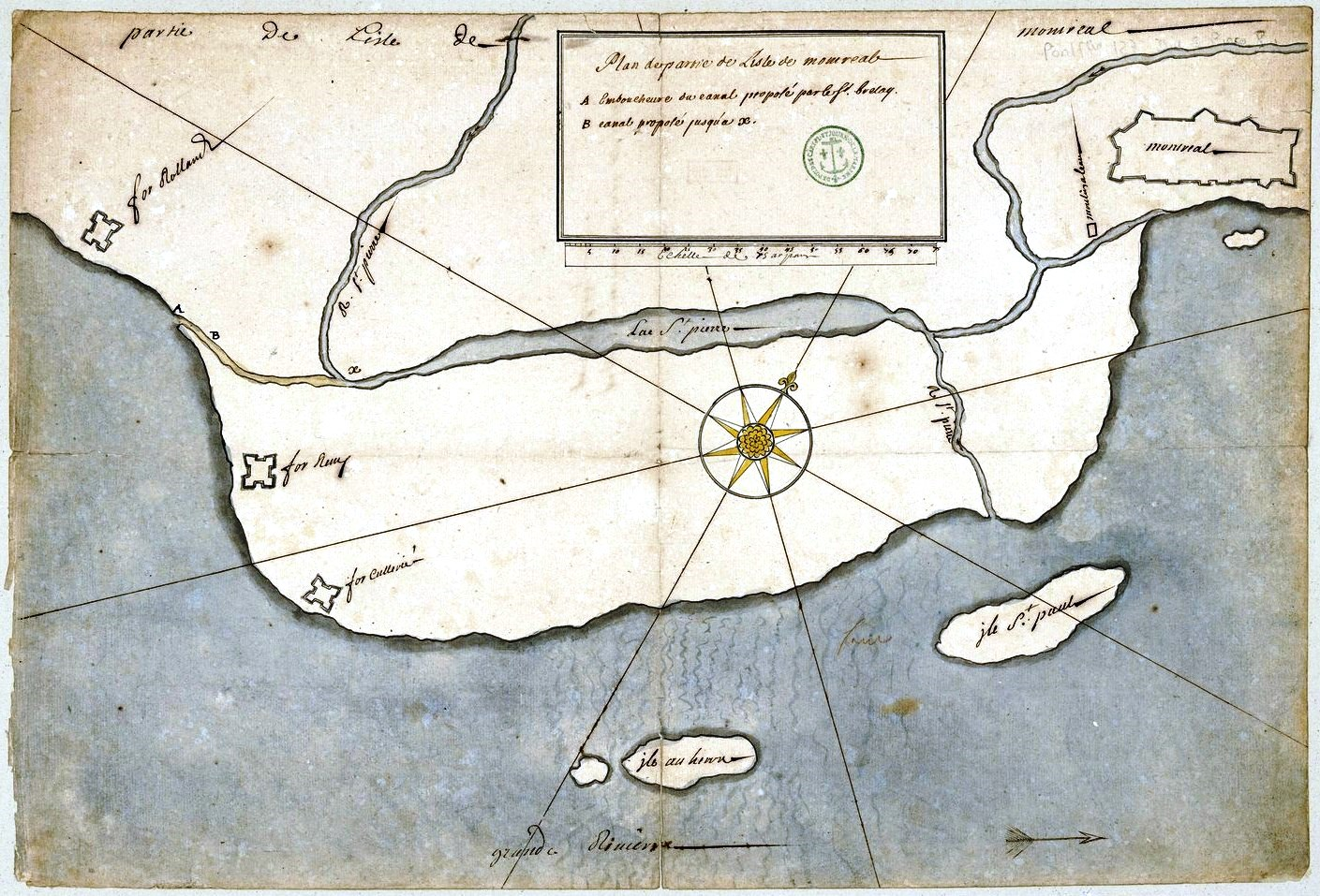 Plan de partie de l'isle de Monreal